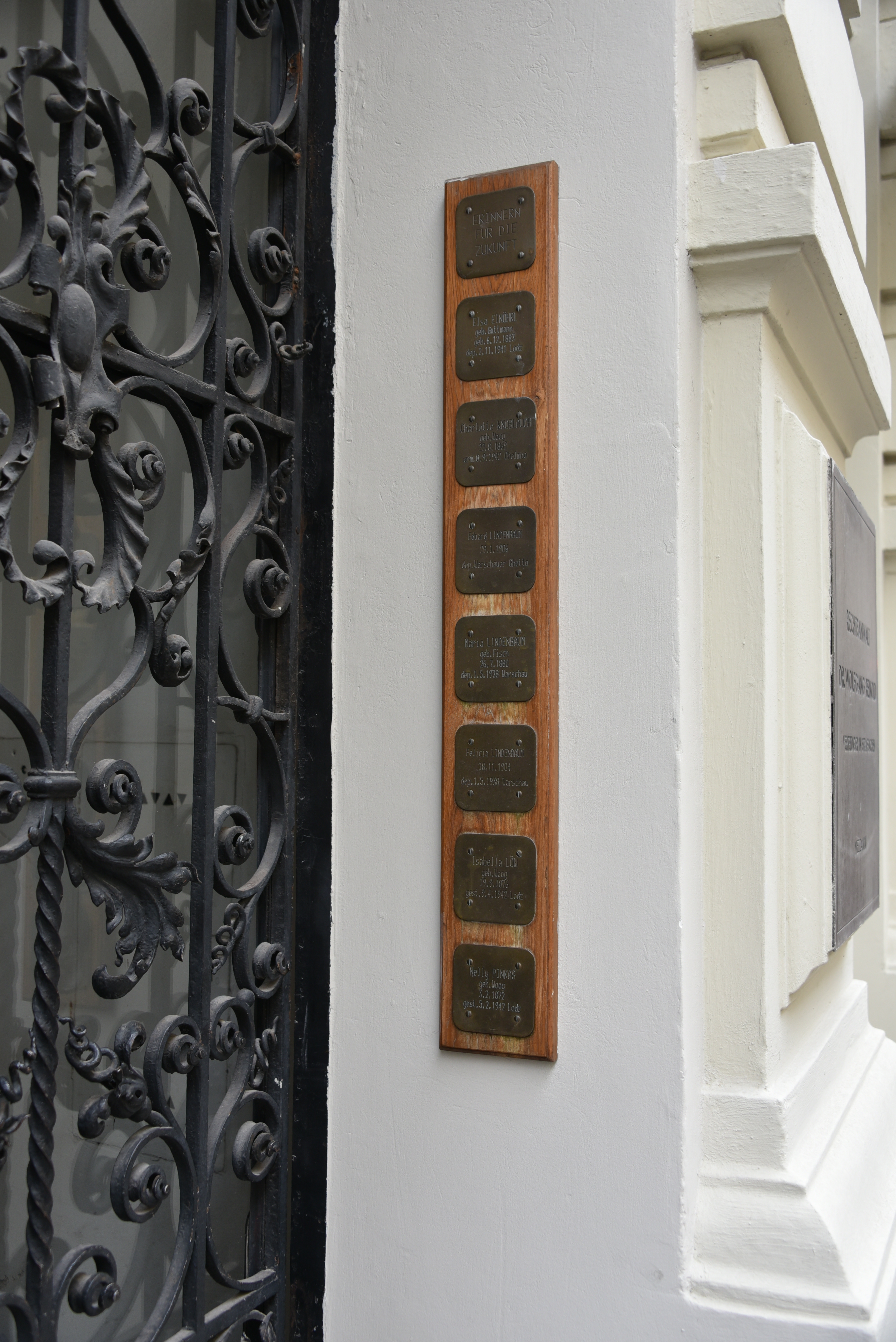 Gedenksteine für Opfer des Faschismus